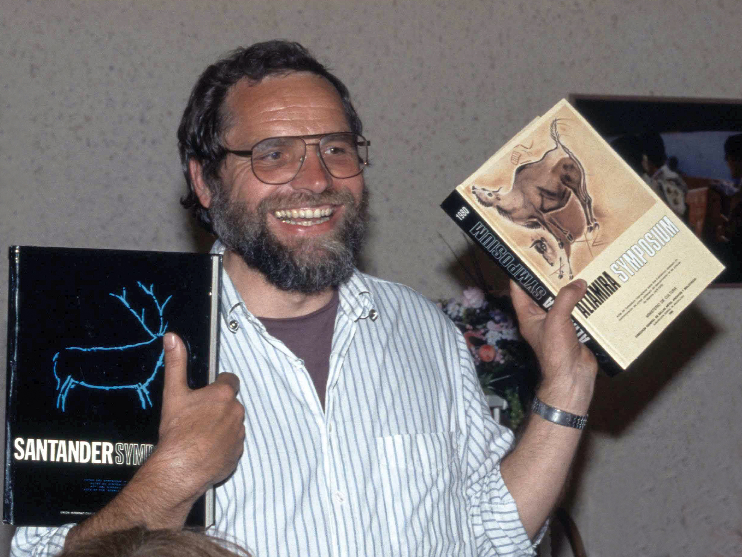 Der deutsche Prähistoriker Joachim Hahn (1942–1997).